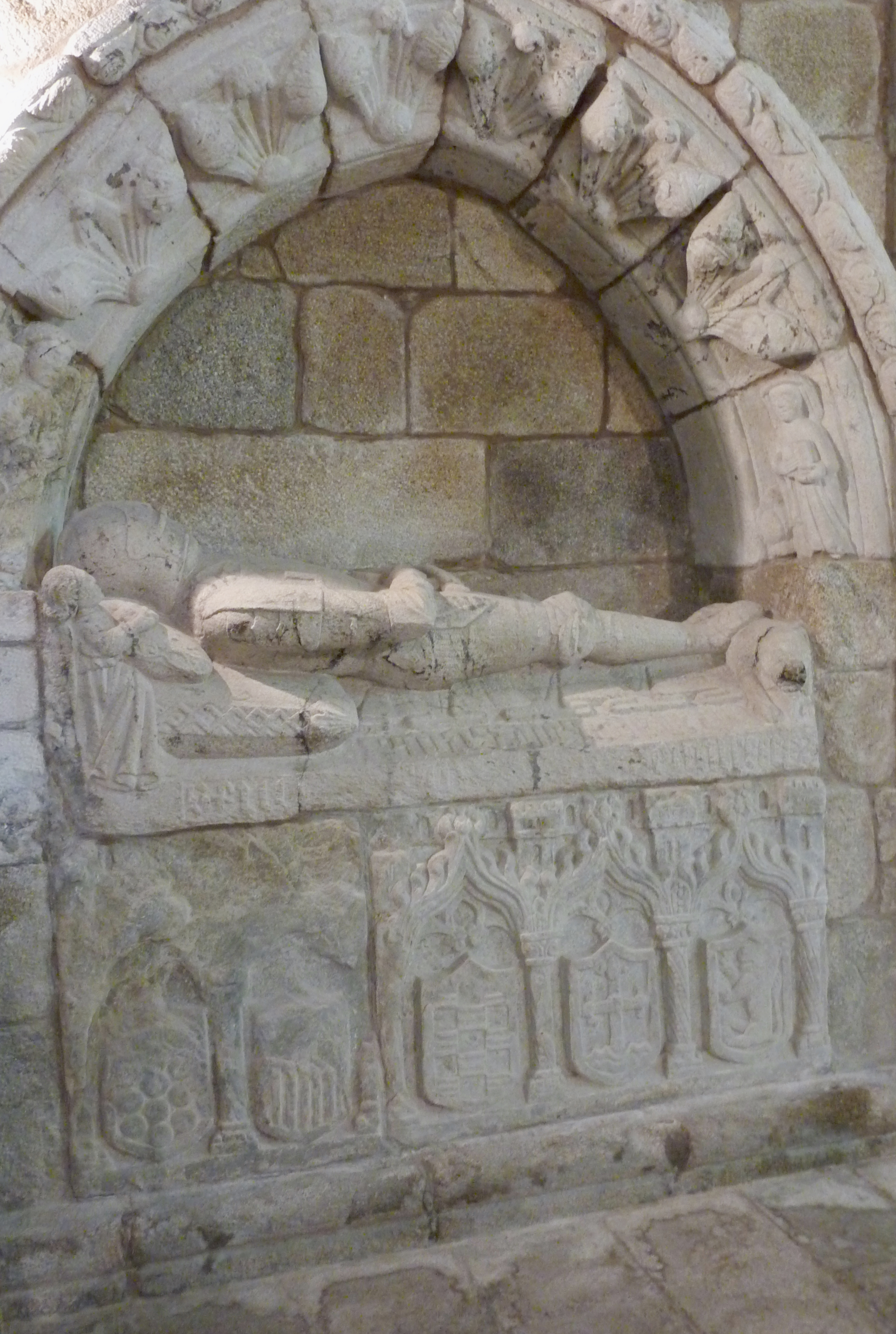 Zisterzienserinnenkloster Santa María de Ferreira de Pantón in Pantón in der spanischen Provinz Lugo (Galicien), Wandnischengrab (15. Jh.) in der Klosterkirche